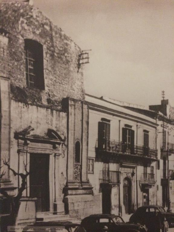 Chiesa dello Stellario in Piazza Ciullo ad Alcamo (abbattuta)